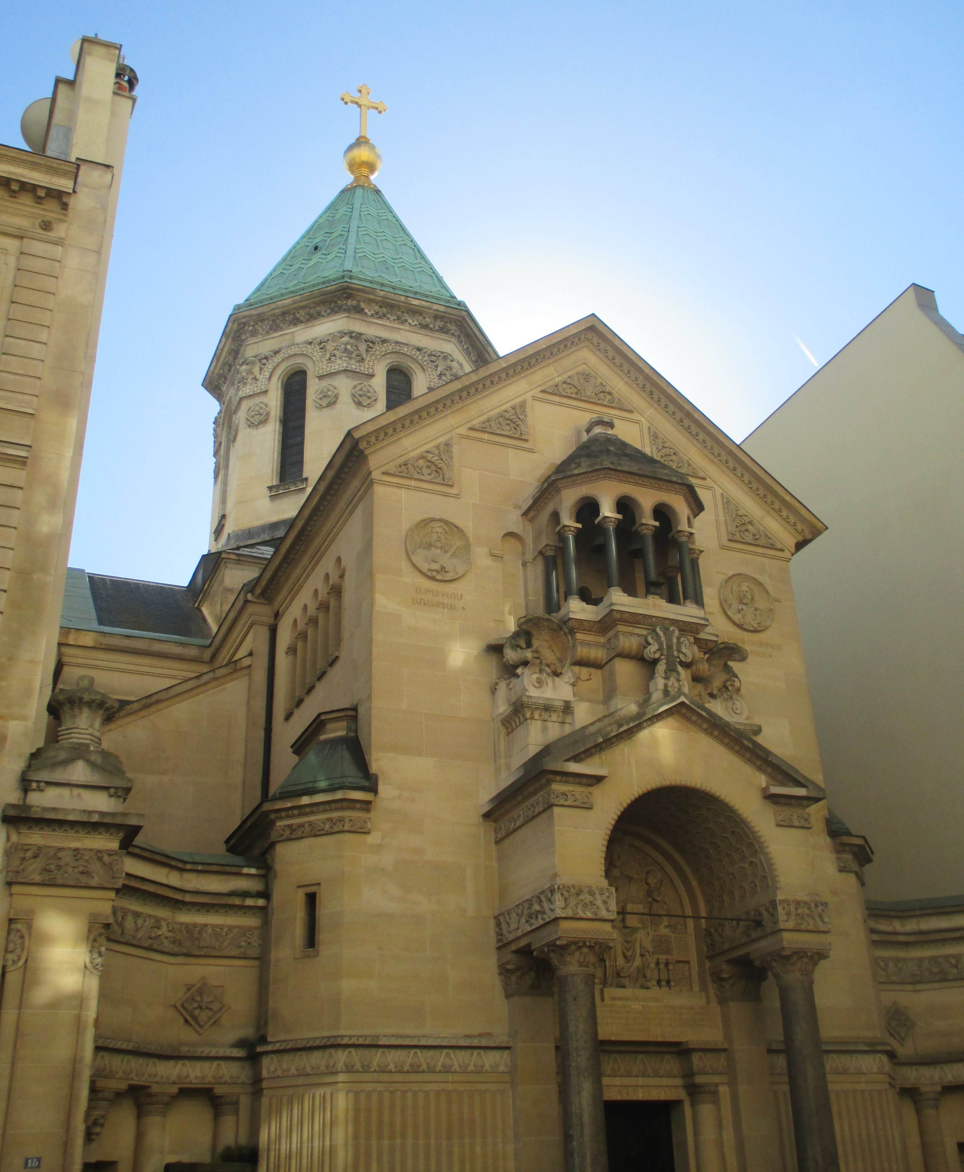 Cathédrale arménienne de Paris.